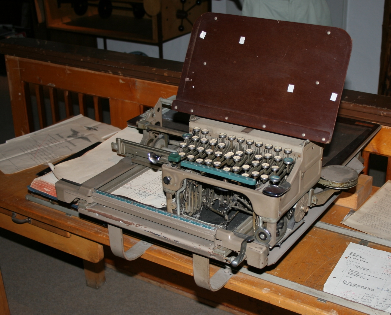 Buchschreibmaschine im Gerichtsmuseum Bad Fredeburg in Schmallenberg.